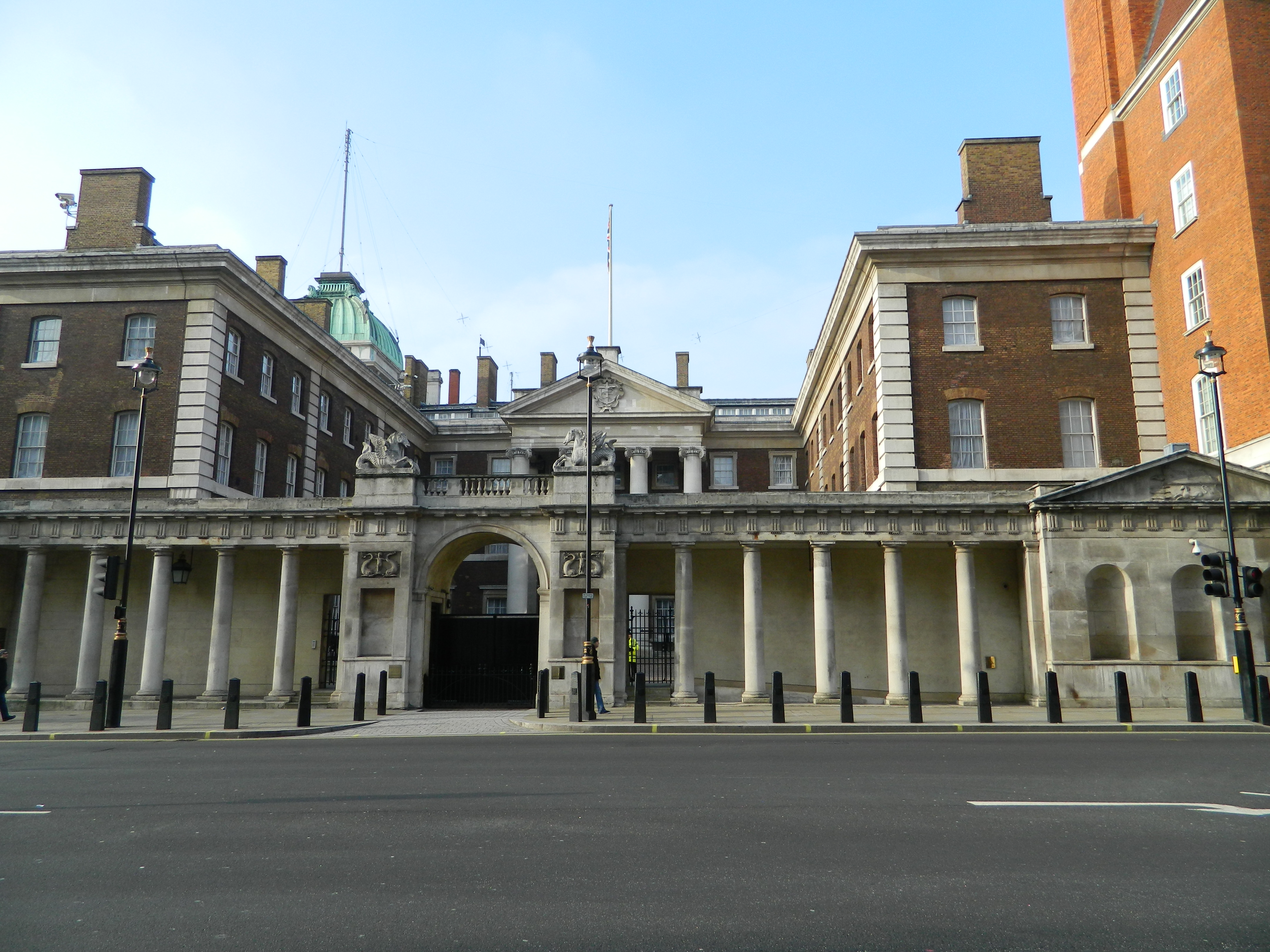 London